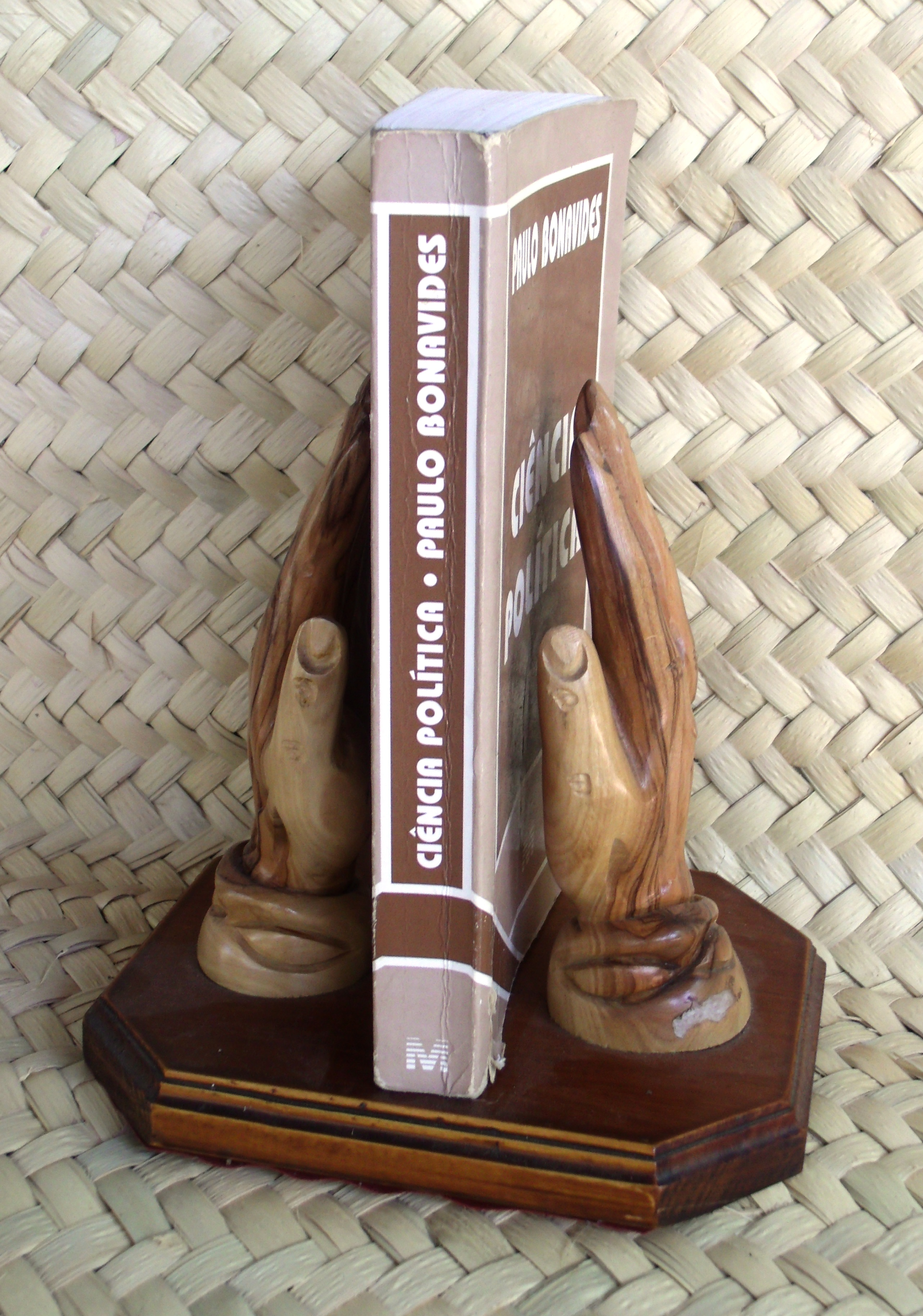 Mão de madeira suporte do livro de Paulo Bonavides, Ciência política.